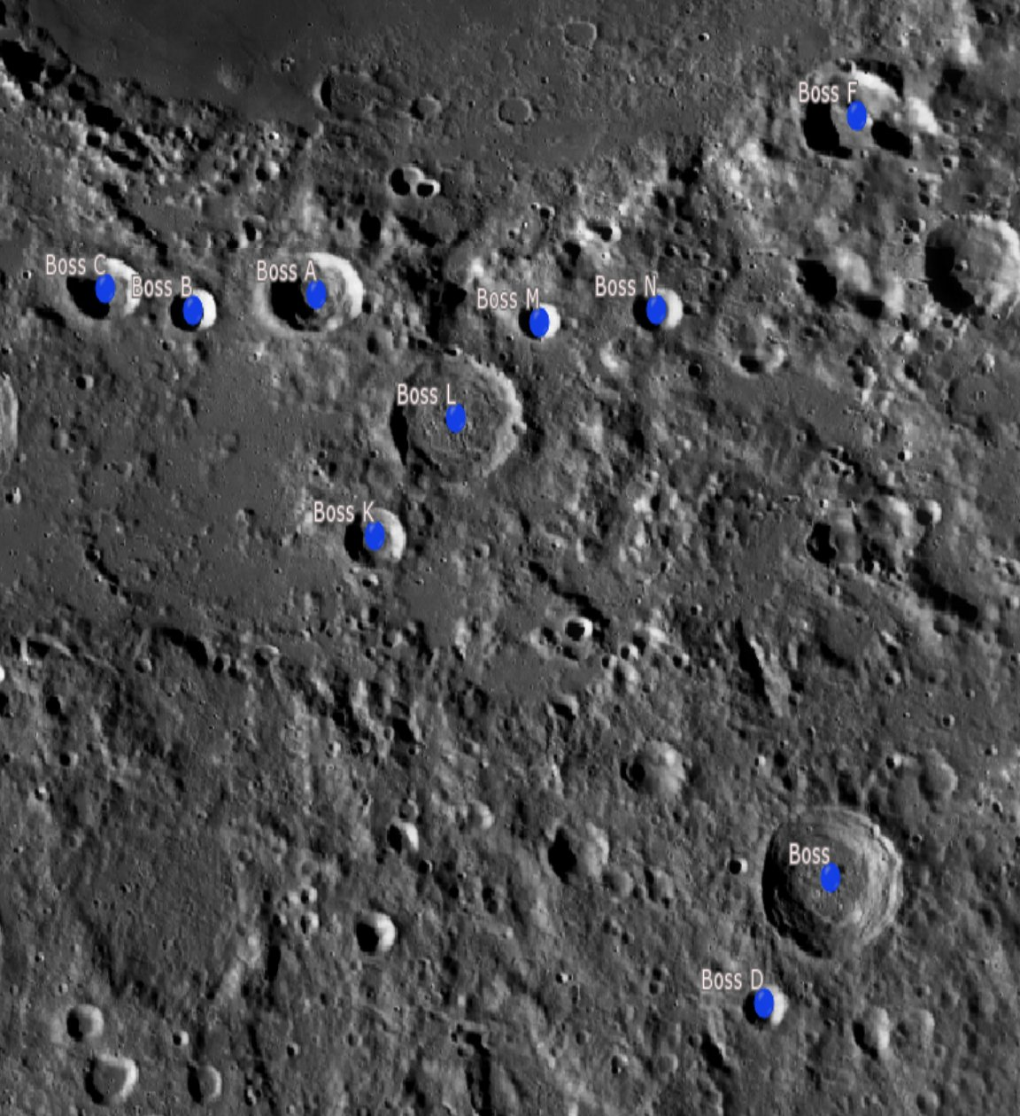 Cráter lunar Boss. Cráteres satélite. (Imagen LRO)